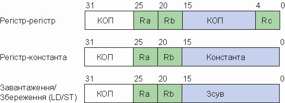 Формат команди DEC Alpha